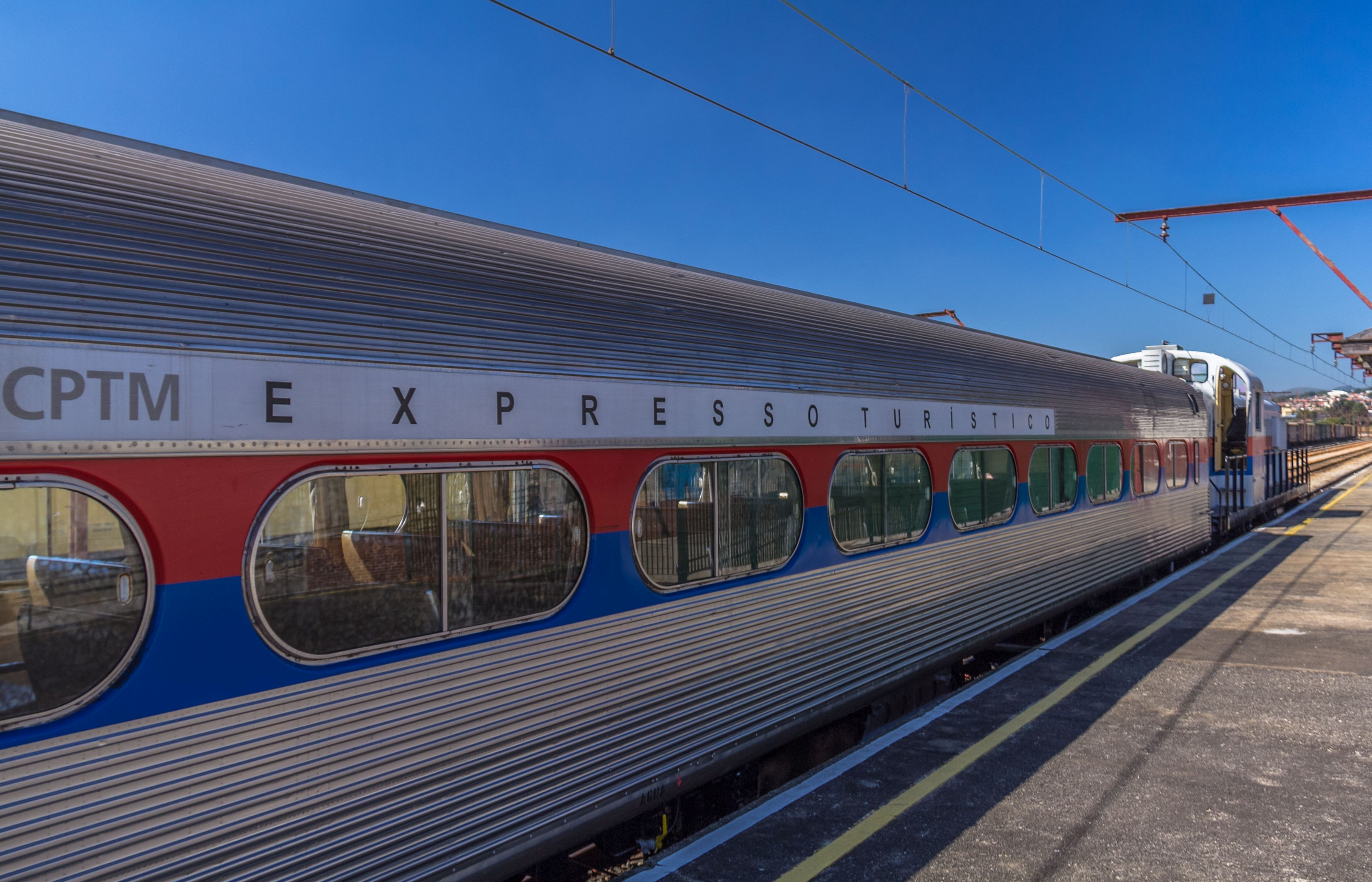 Estaço ferroviária de Jundiai e expresso turístico da CPTM